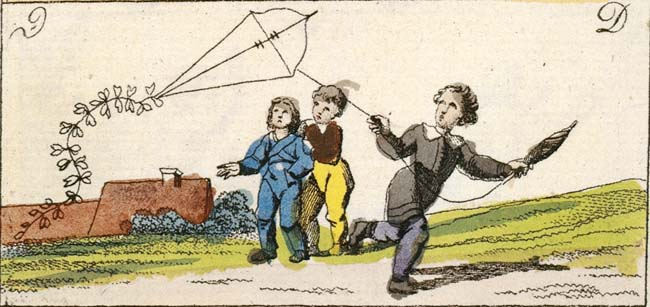 Drachensteigen